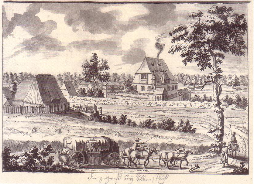 Scan einer Federzeichnung vom Schloss Malmsbach